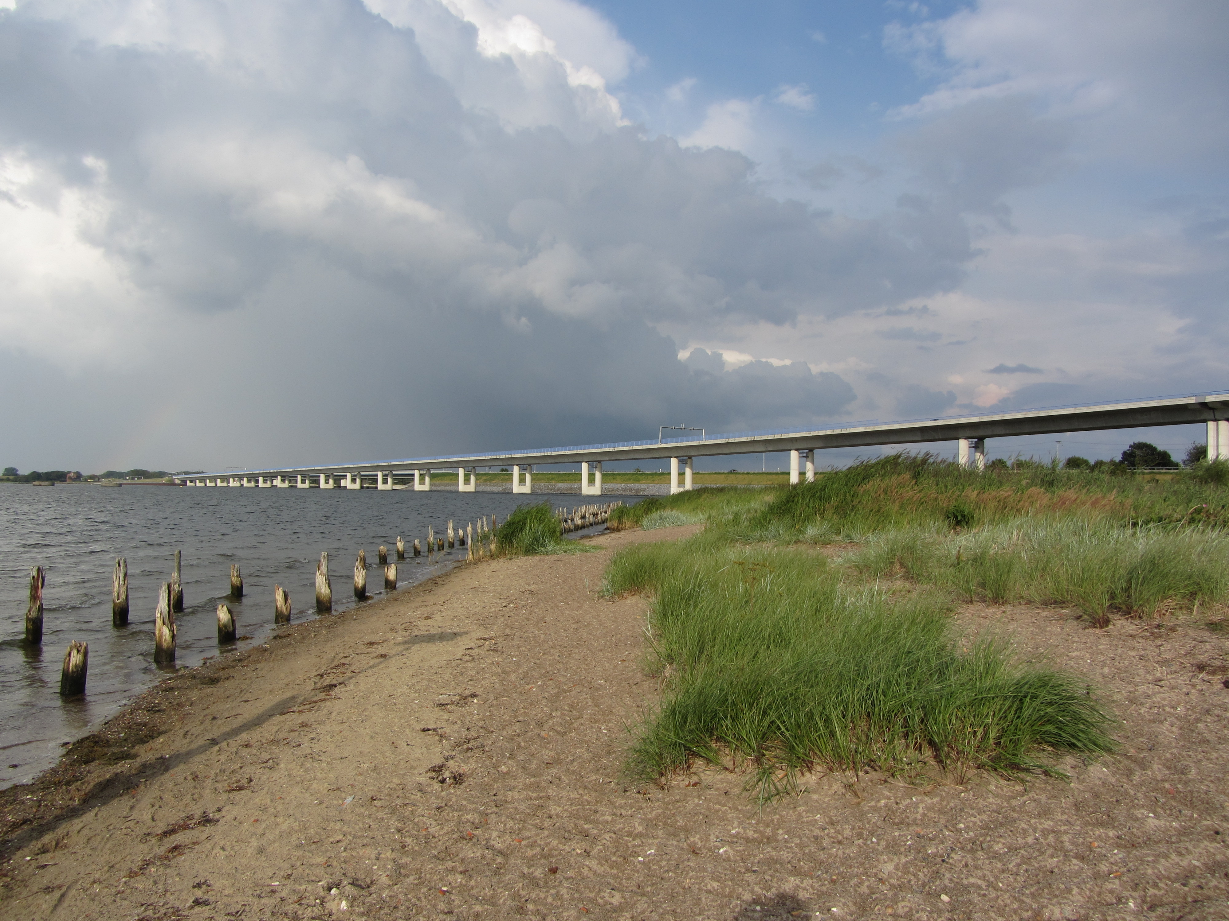 Rügenbrücke